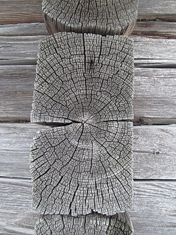 Юрацішкі. Драўляны дом